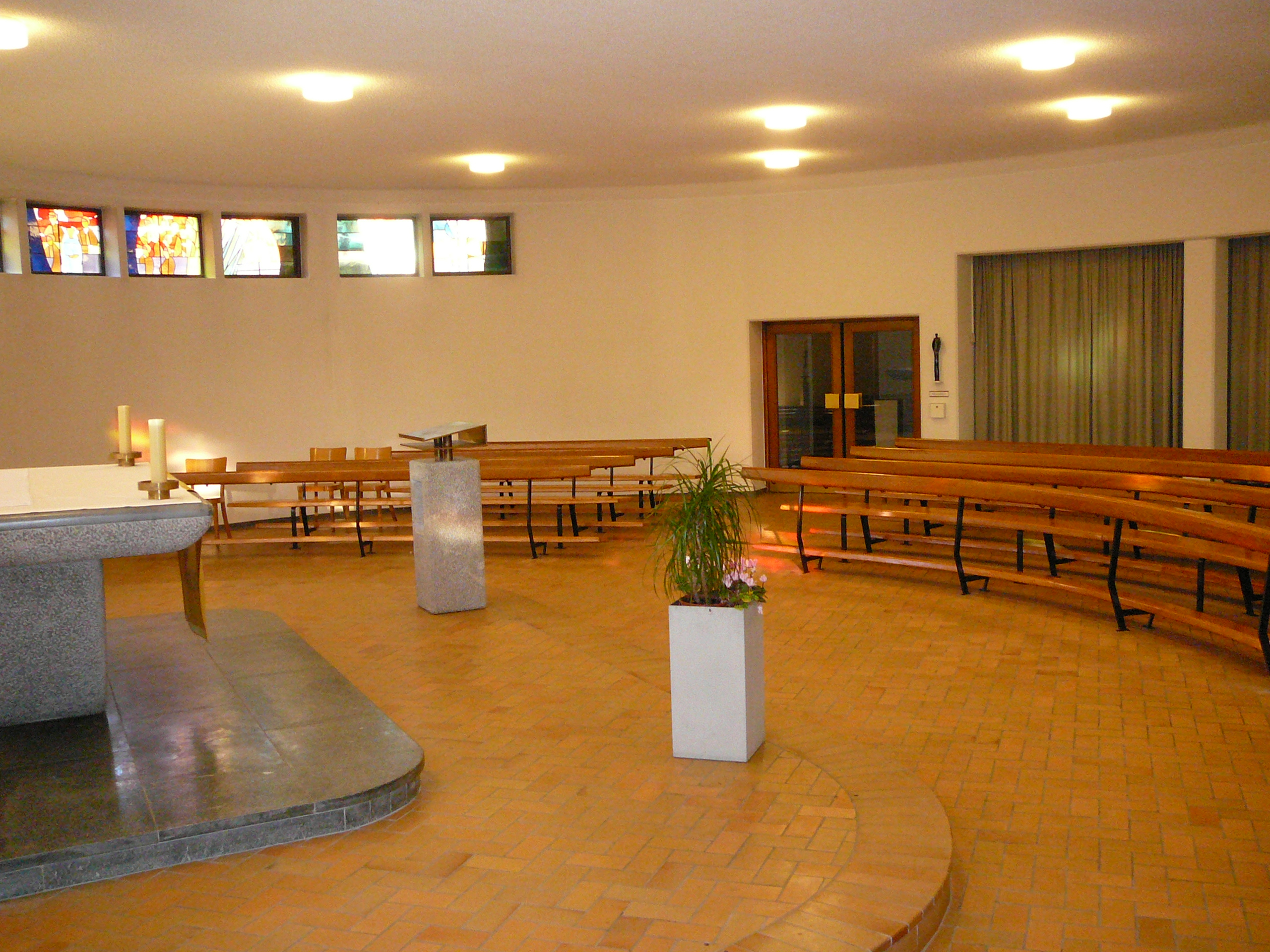 Römisch-katholische Pfarrkirche St. Laurentius Winterthur-Wülflingen, Krypta